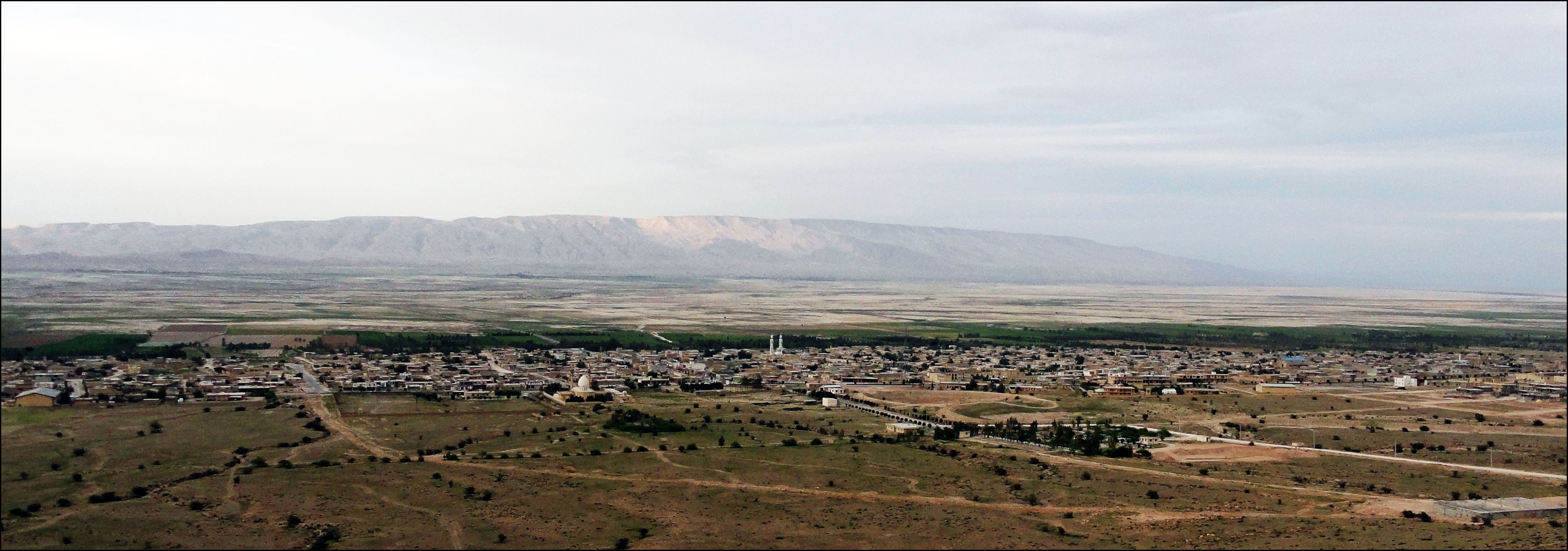 دورنمایی از شهر علامرودشت در جنوب استان فارس